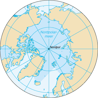 Die Karte stammt aus dem CIA World Factbook (dort als "xq-map.gif").